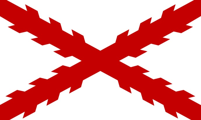 blass